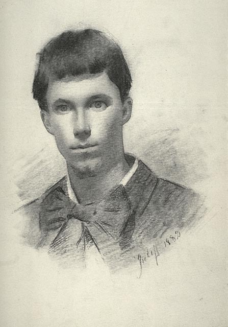 Self-portrait